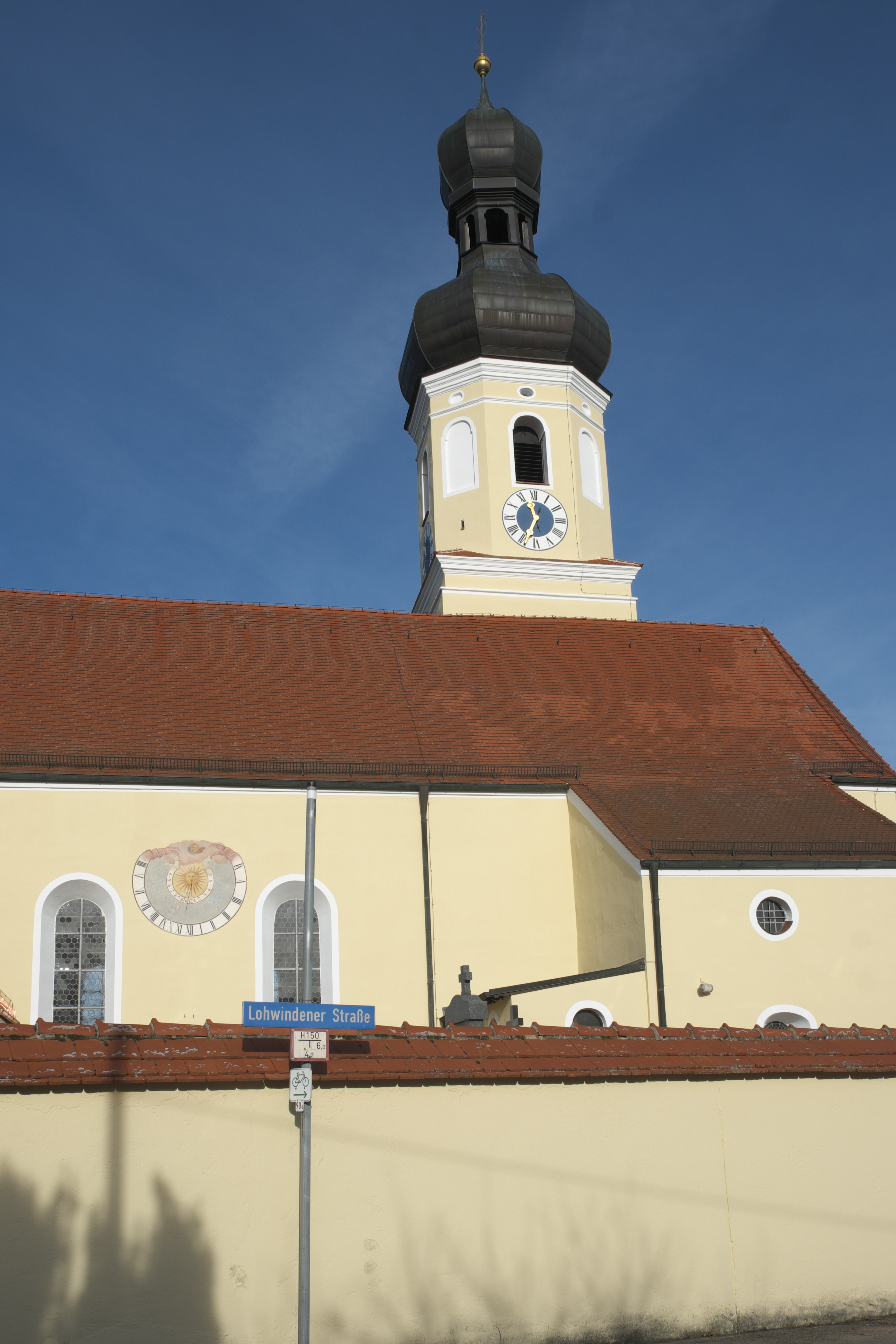 Katholische Pfarrkirche Mariä Heimsuchung in Gosseltshausen (Wolnzach) im Landkreis Pfaffenhofen an der Ilm (Bayern/Deutschland)